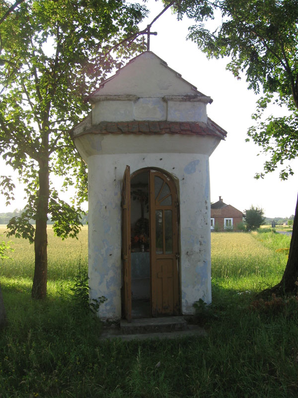 Kapliczka w Glinach Małych (gm. Borowa, pow. Mielec)